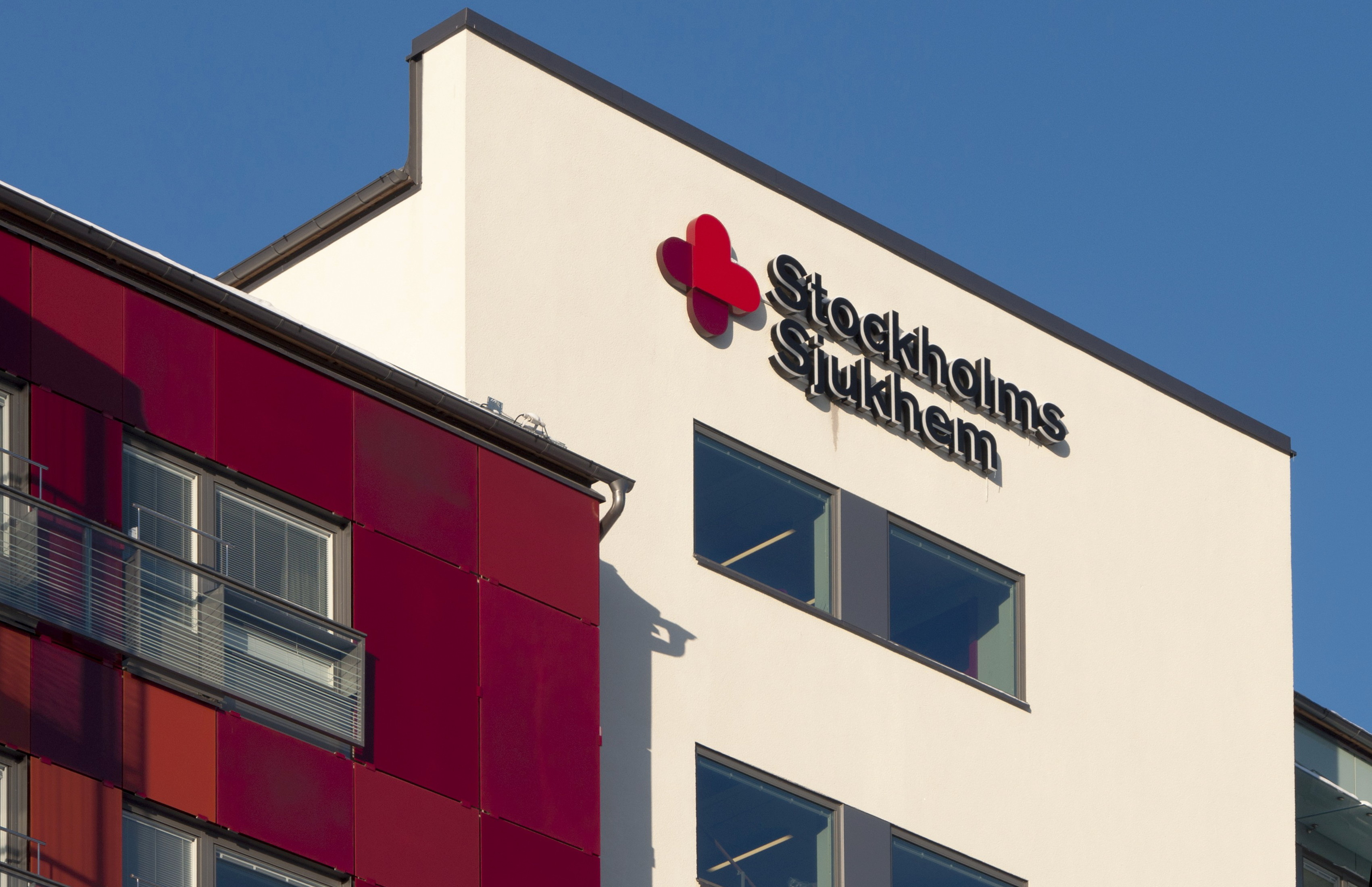 Stockholms sjukhem, Mariebergsgatan 22, Stockholm. Byggnad: Tengbom arkitekter 2012/2013